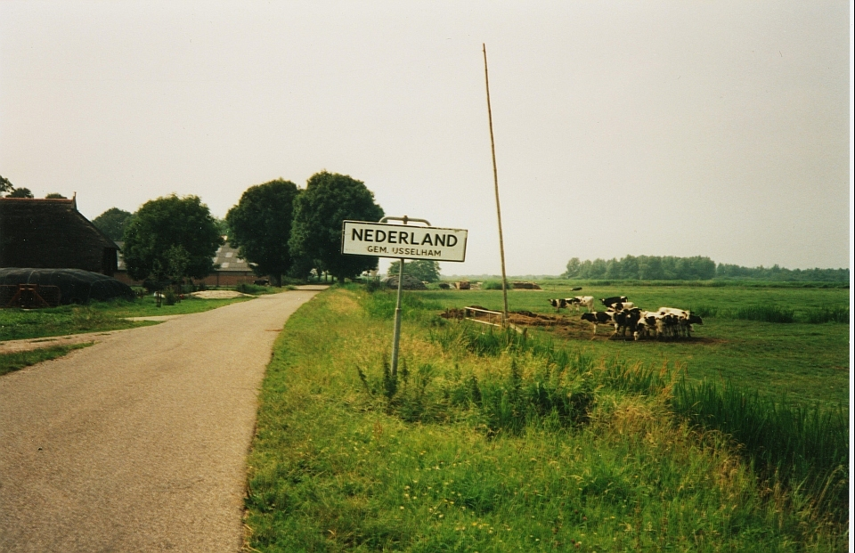 Het gehucht Nederland in de Kop van Overijssel